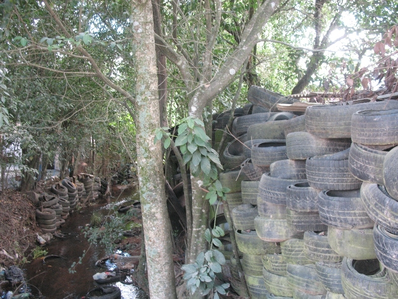 Pneus sendo usados para evitar o desmoronamento na beira do arroio. É solução ou mais problemas?